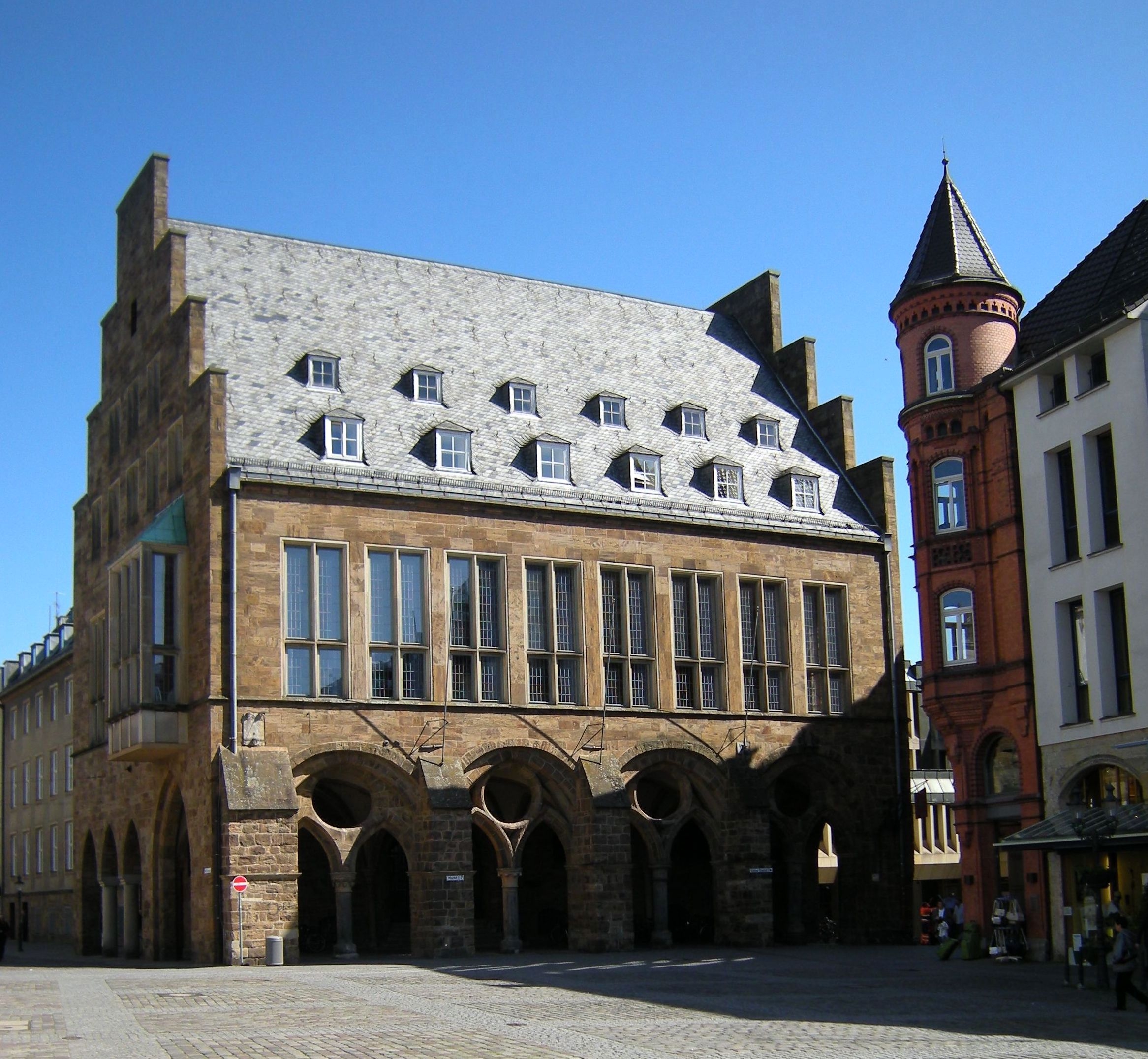 Minden an der Weser-Rathaus mit gewölbtem Laubengang 13. Jh..jpg